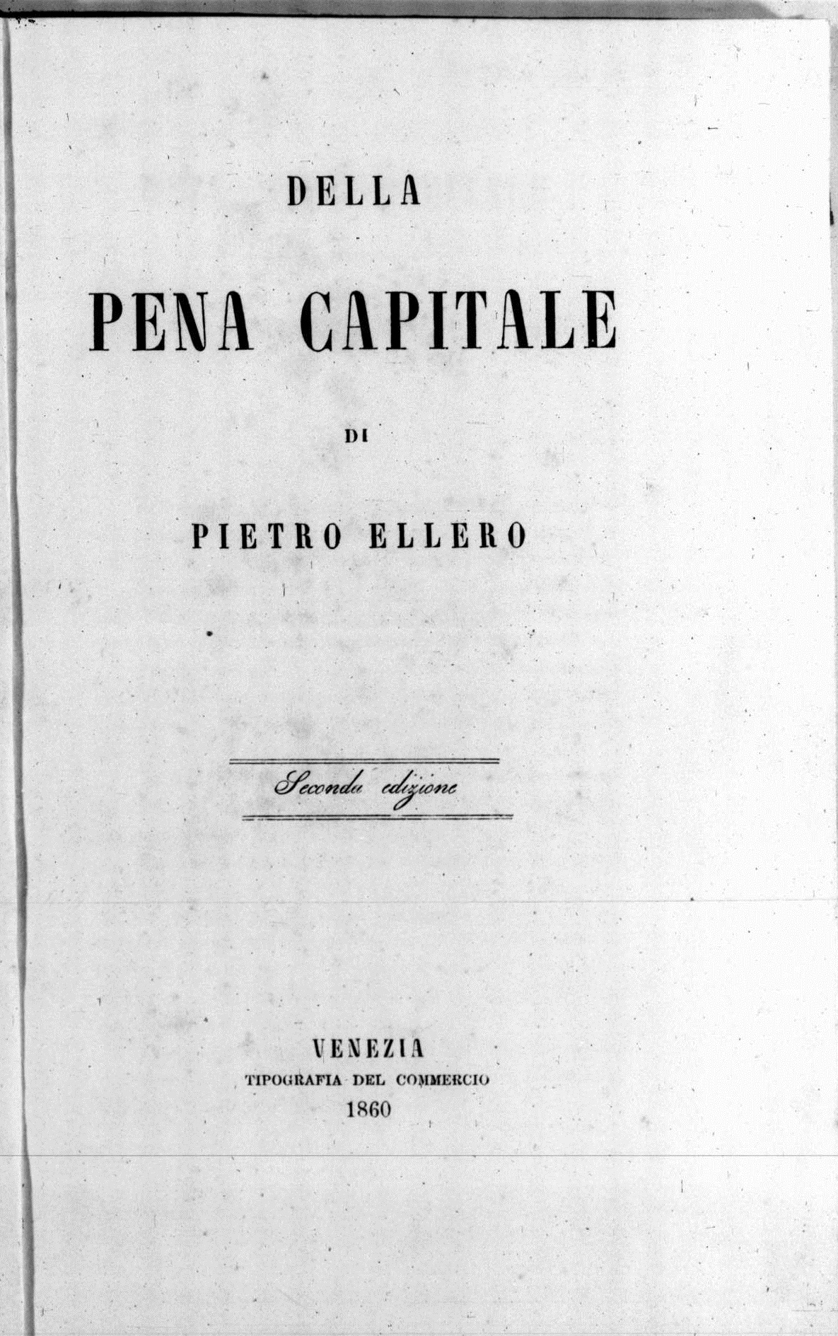 Frontespizio